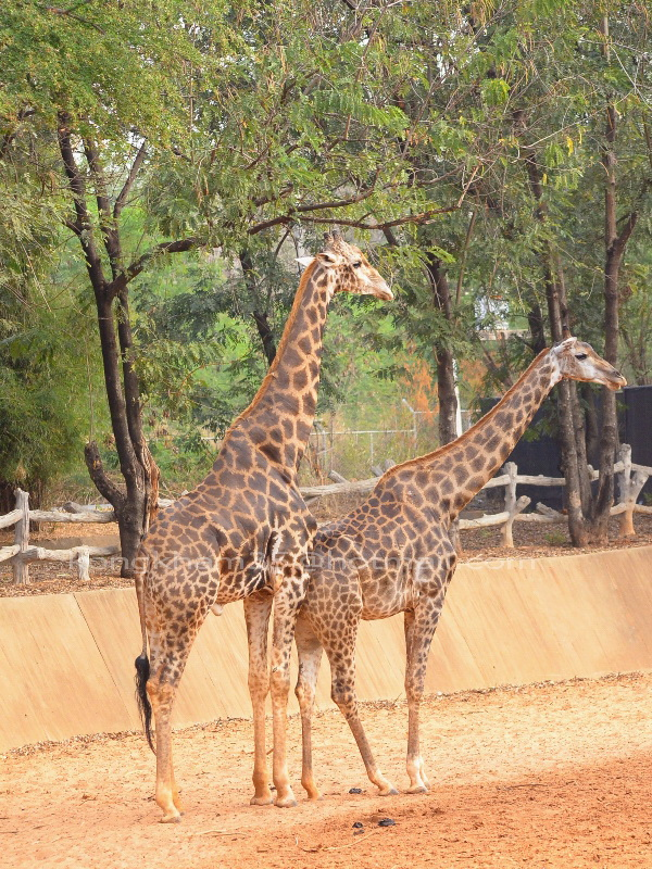 ช่วงที่ยีราฟเพศผู้ติดตามยีราฟเพศเมียที่เป็นสัดเพื่อทำการผสม